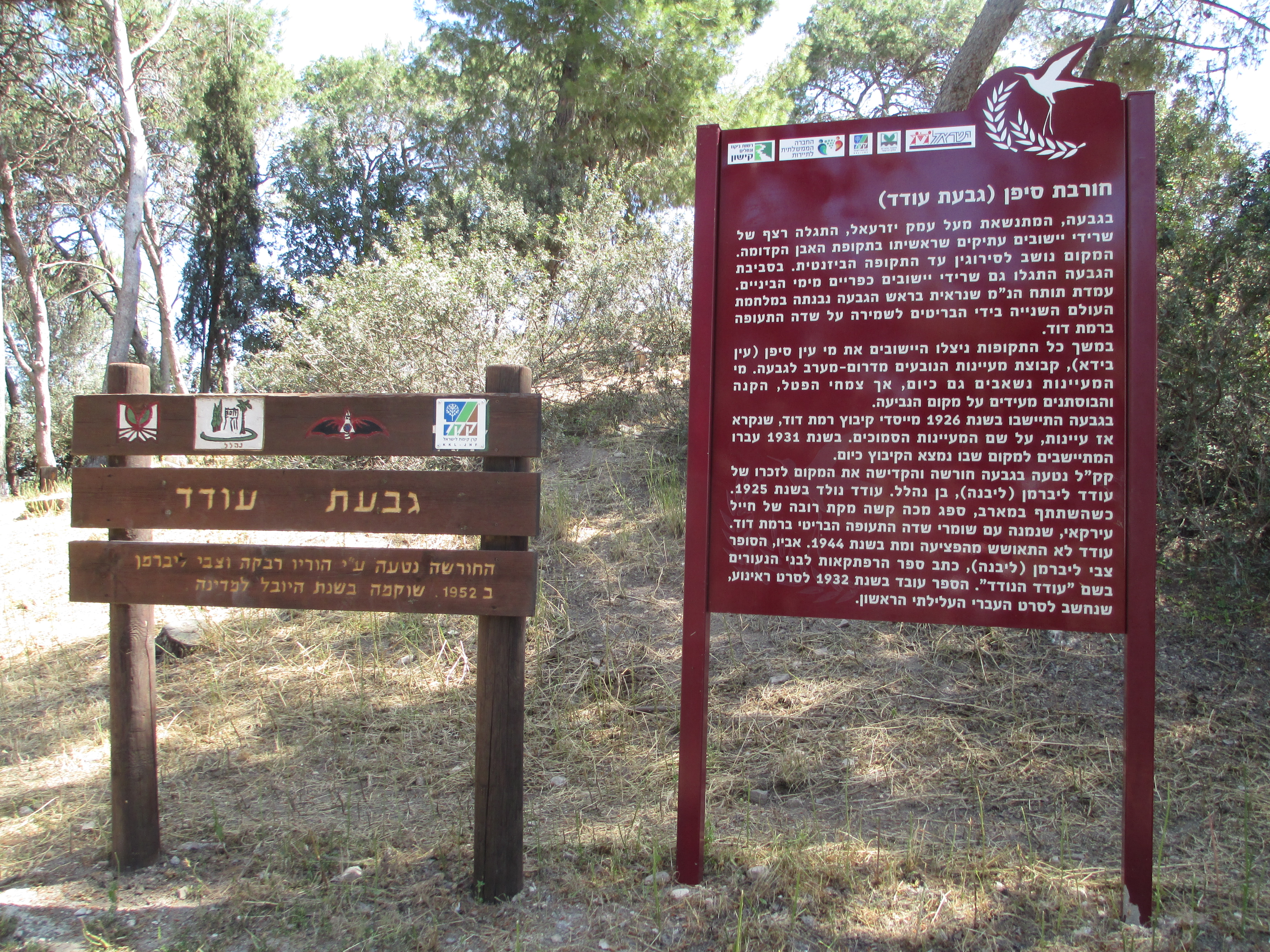 גבעת עודד